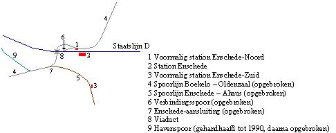 PD door eigen werk